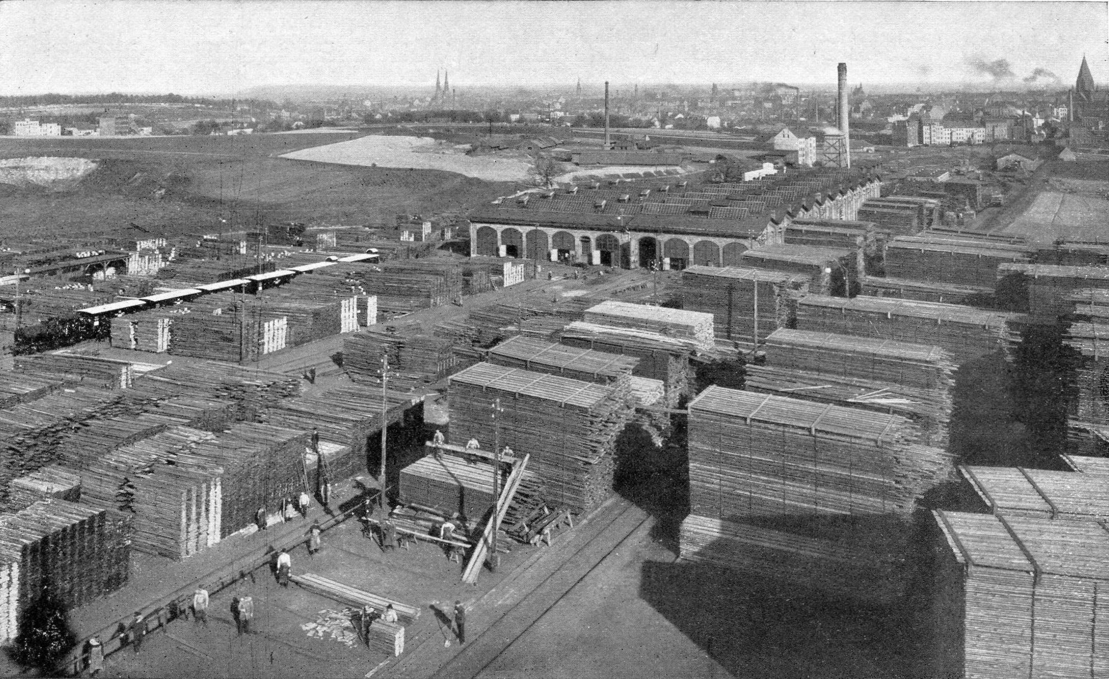 Blick über das Werk II des Görlitzer Waggonbaus und die Stadt Görlitz um 1900